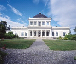 Ulefos Hovedgaard sett fra haven. Bildet er avklart for bruk av Ulefos Hovedgaard